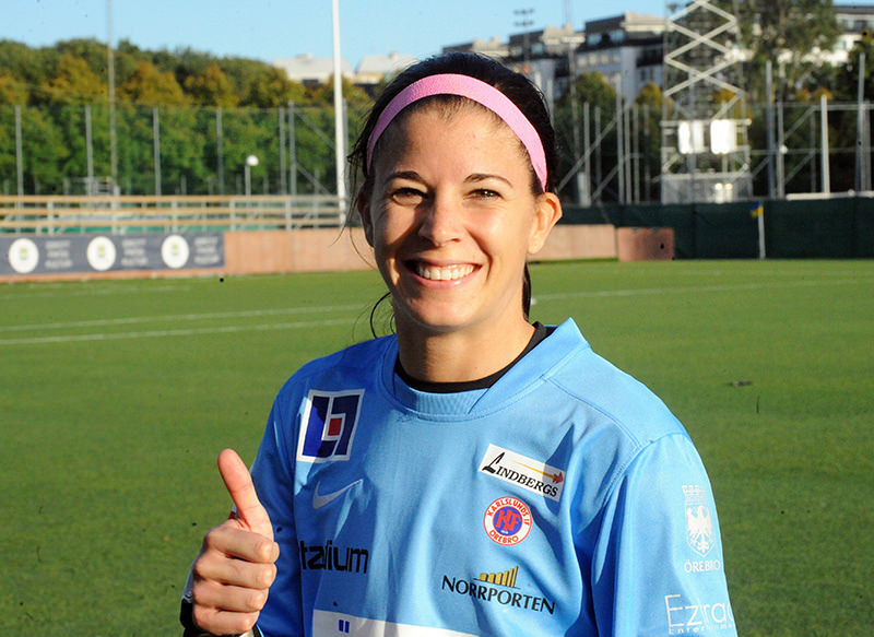 KIF Örebro's Canadian goalkeeper Stephanie Labbé